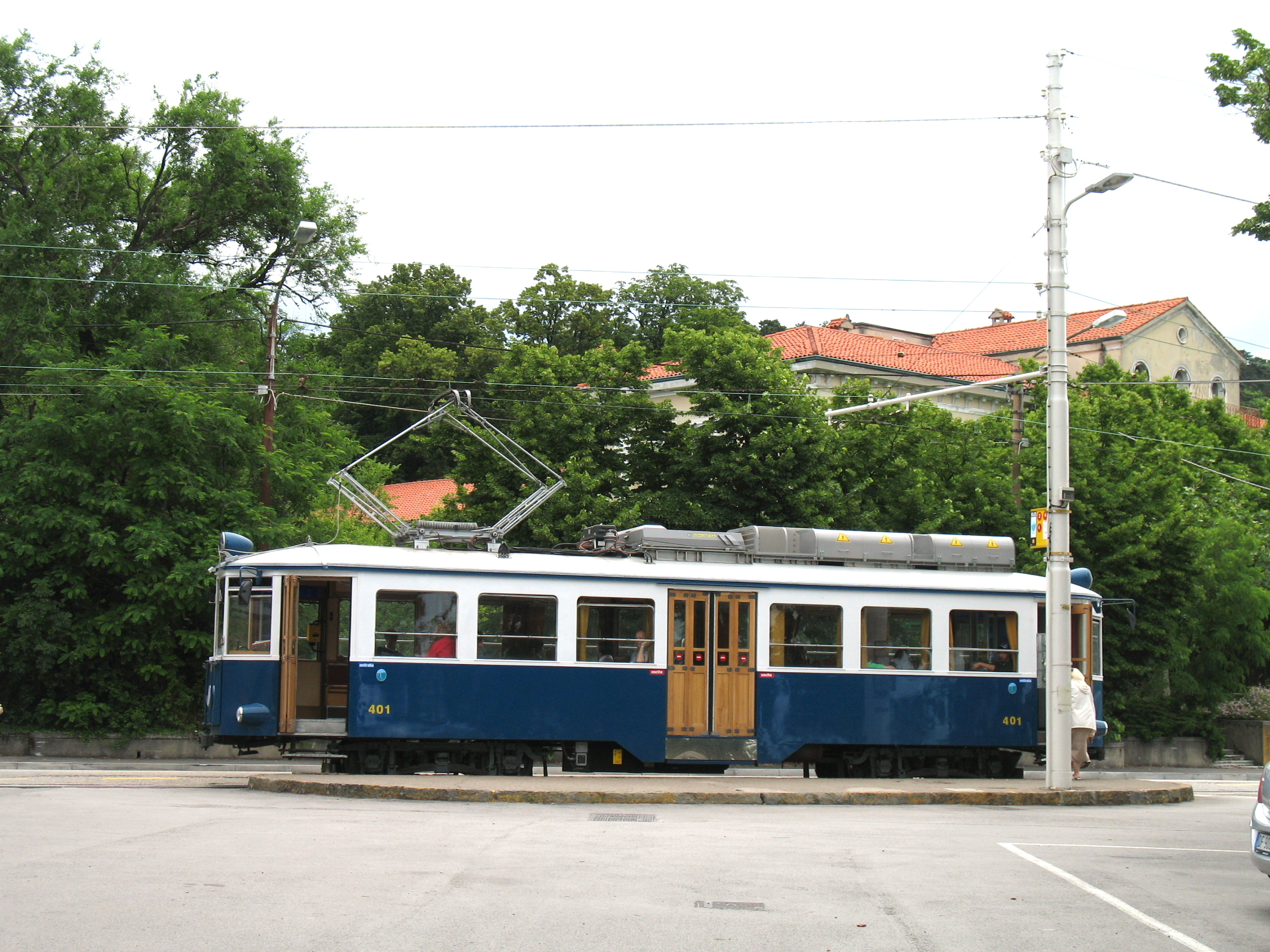 Immagine da Trieste. Trenovia di Opicina - fermata Obelisco